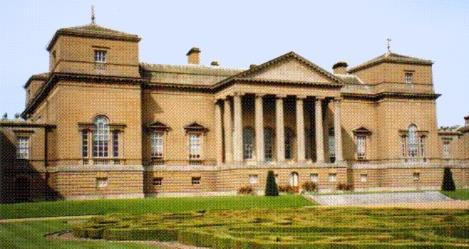 Holkham Hall, Norfolk, England